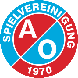 Logo des SV Ahlerstedt/Ottendorf